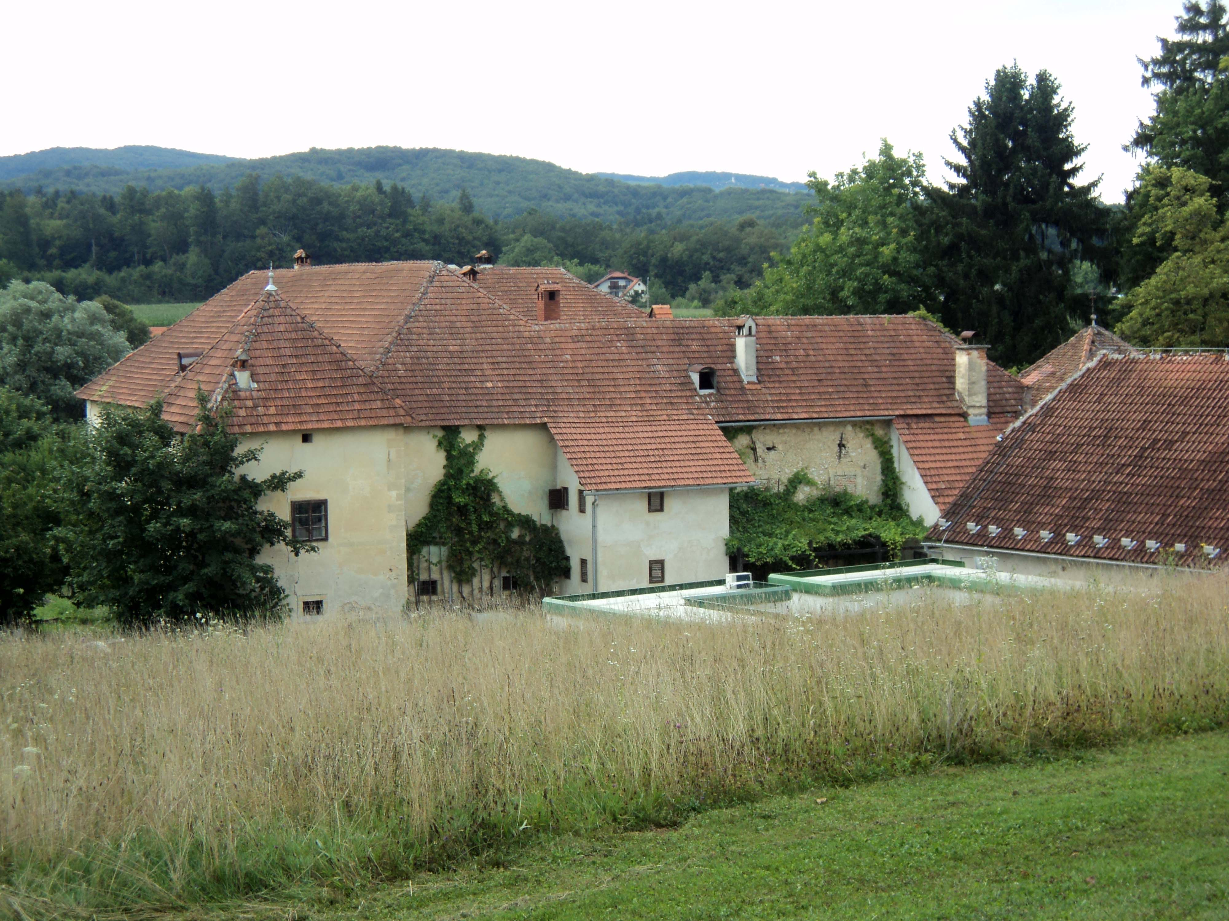 Dvorec Struga II. 2013